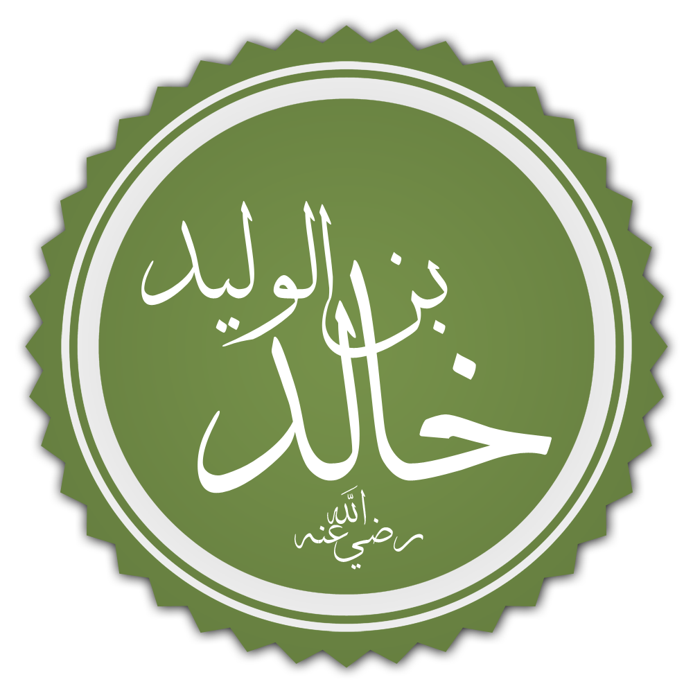 تخطيط إسم سيدنا خالد بن الوليد